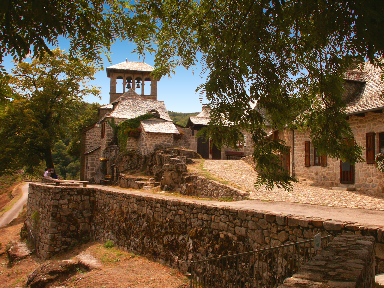 Bes-Bédène (Commune de Campouriez; Aveyron) Auteur : Christophe Poulet